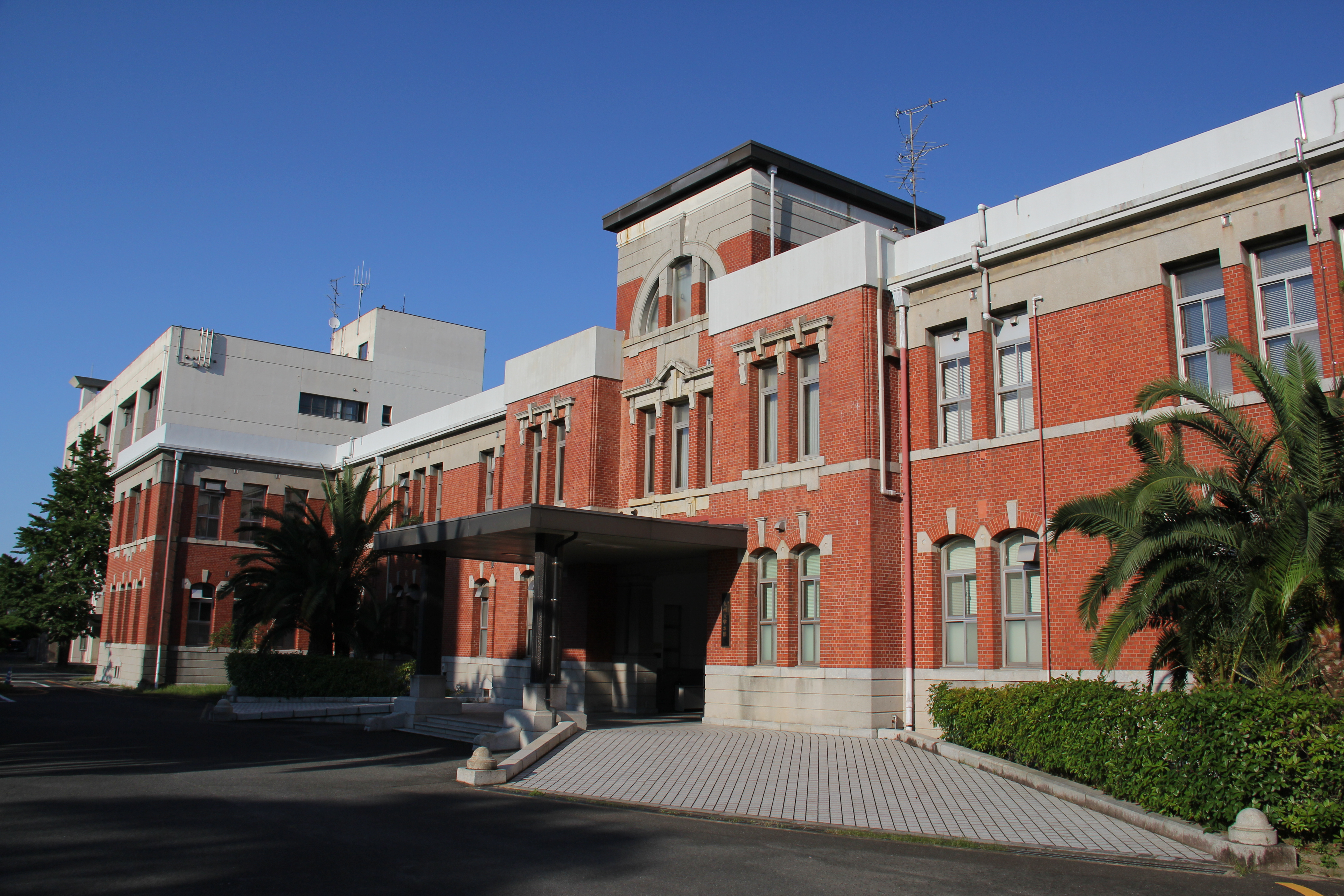 九州大学旧本部（箱崎地区） Canon EOS 60D